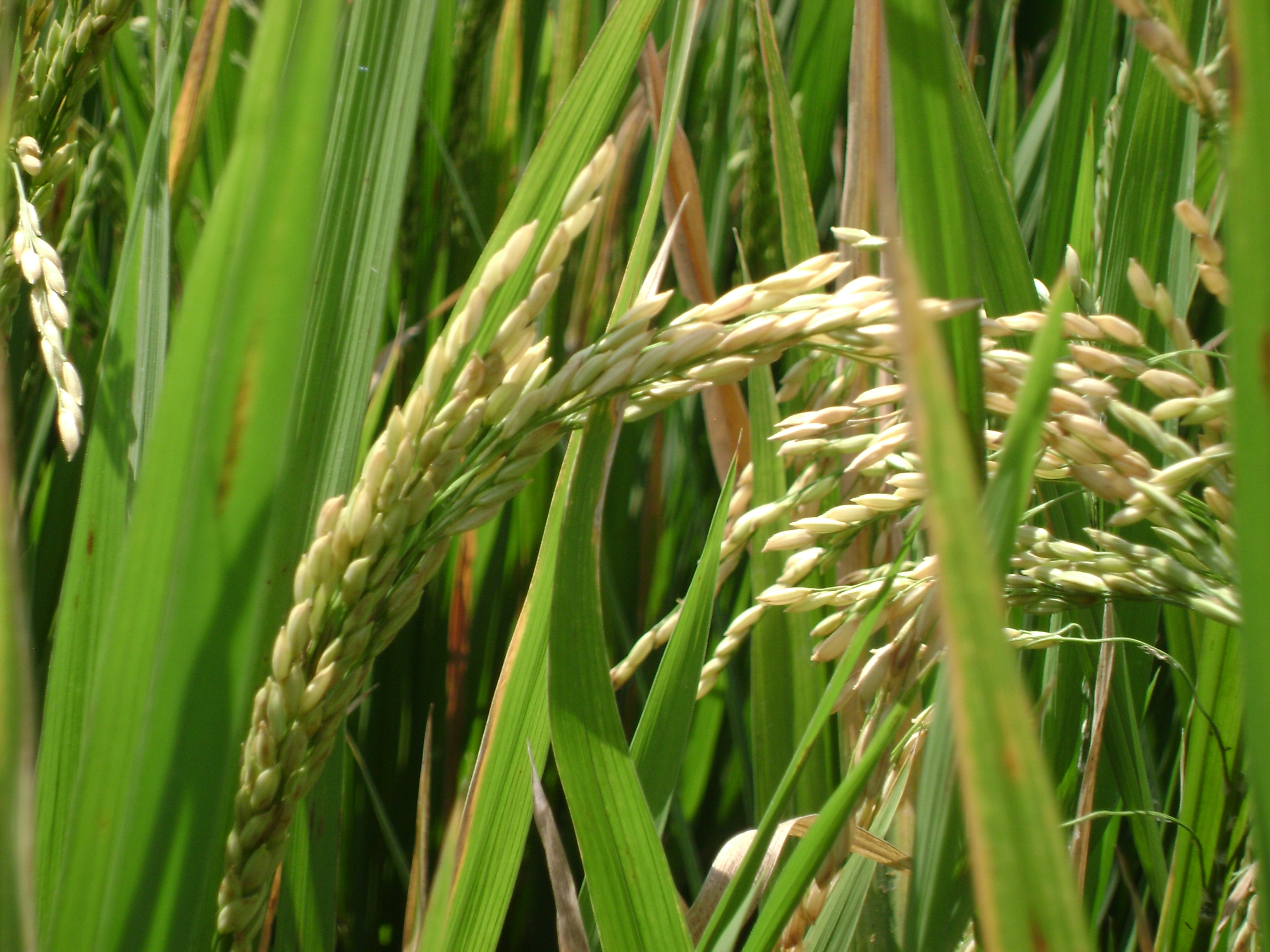 நெற் பயிர்(அரிசி) ஆங்கில பெயர் : Rice தாவரவியல் பெயர் : Oryza sativa நெற்பயிறுலிருந்து எடுக்கப்படும் அரிசியானது தமிழர்களின் உணவுகளில் முக்கியபங்கு வகிக்கிறது . அரிசி வகைகள் :- அன்னமழகி அரிசி இழுப்பைப்பூச்சம்பா அரிசி ஈர்க்குச்சம்பா அரிசி கருங்குறவை அரிசி கல்லுண்டைச்சம்பா அரிசி காடைச்சம்பா அரிசி கார் அரிசி காளான்சம்பா அரிசி கிச்சிலிச்சம்பா அரிசி குண்டுச்சம்பா அரிசி குறுஞ்சம்பா அரிசி குன்றிமணிச்சம்பா அரிசி கைவரைச்சம்பா அரிசி கோடைச்சம்பா அரிசி கோரைச்சம்பா அரிசி சீதாபோகம் அரிசி சீரகச்சம்பாஅரிசி செஞ்சம்பா அரிசி புழுகுச்சம்பா அரிசி மணக்கத்தை அரிசி மணிச்சம்பா அரிசி மல்லிகைச்சம்பா அரிசி மிளகுச்சம்பா அரிசி மைச்சம்பா அரிசி வளைதடிச்சம்பா அரிசி வாலான் அரிசி